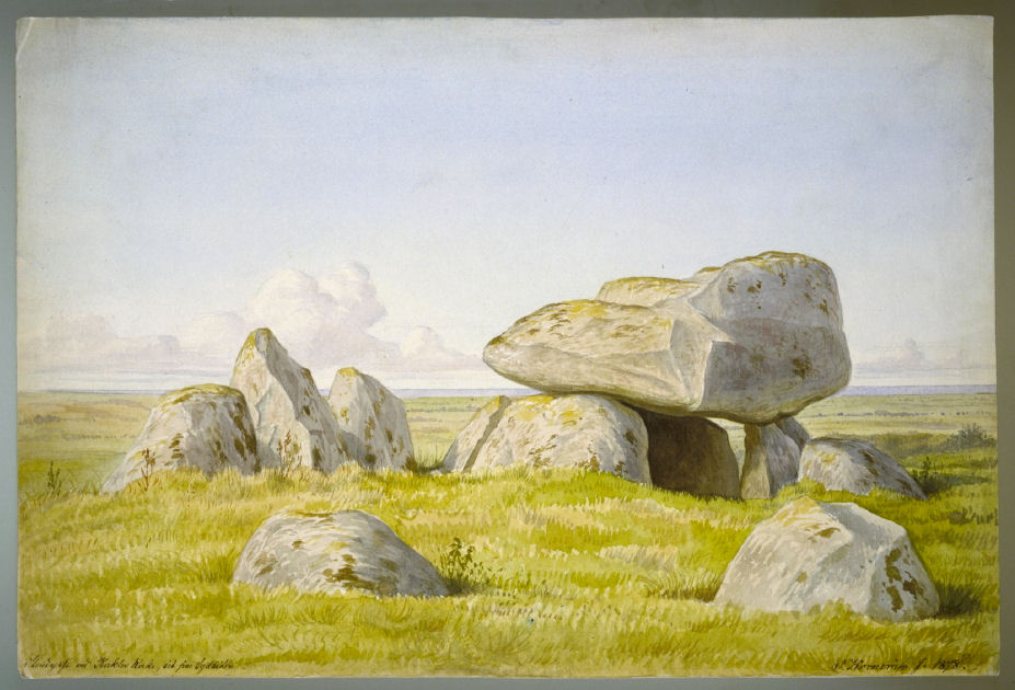 Akvarel af Kornerup fra 1878. Stendysse ved Raklev Kirke, set fra sydsiden. Raklev sogn.